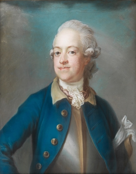 Porträtt av Magnus Fredrik Brahe uniform för Södra skånska kavalleriregementet med bröstharnesk och armbindel som signalerade Gustav III:s statsvälvning 1772. Porträtt i pastell av Gustaf Lundberg. Tillhör Nordiska museet med inventarienummer: NM.0074612